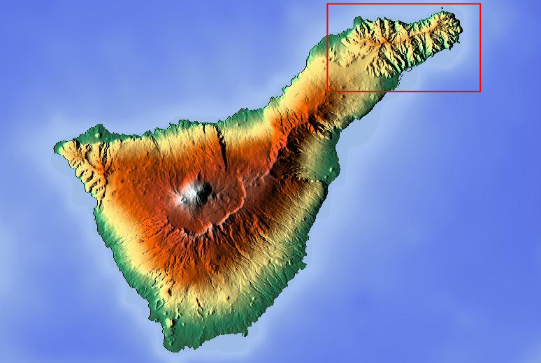 Localización del Macizo de Anaga respecto a la isla de Tenerife.